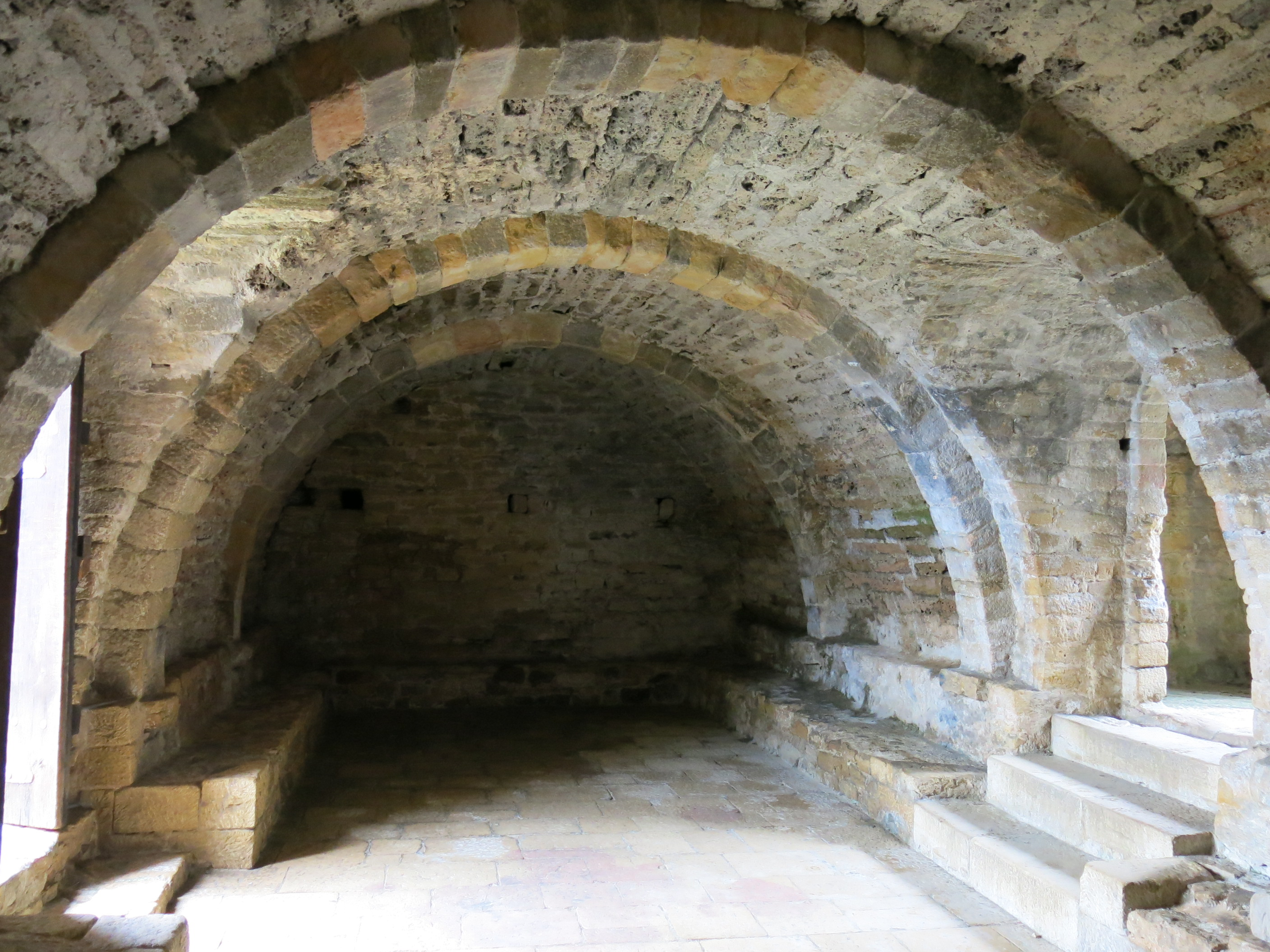 Iglesia de Santa María del Naranco